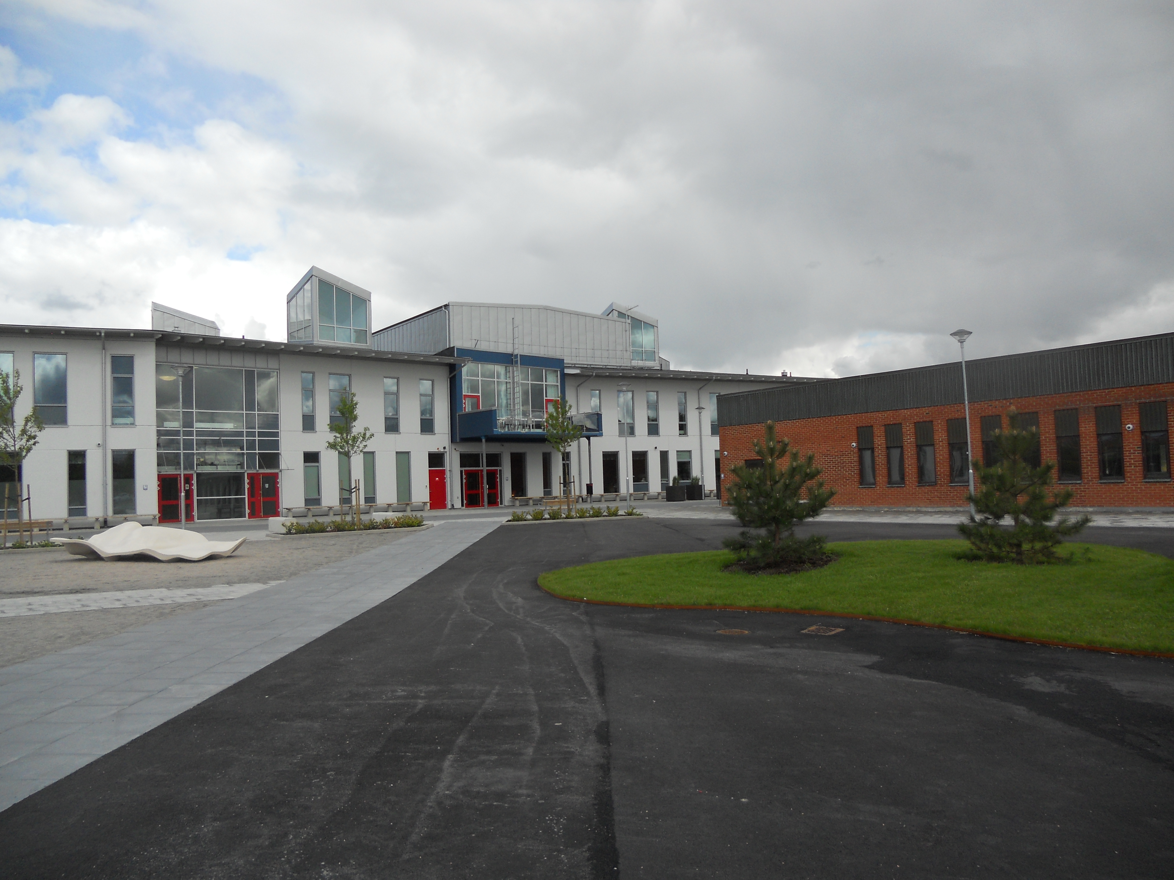 Torpaskolan i Vänersborg.